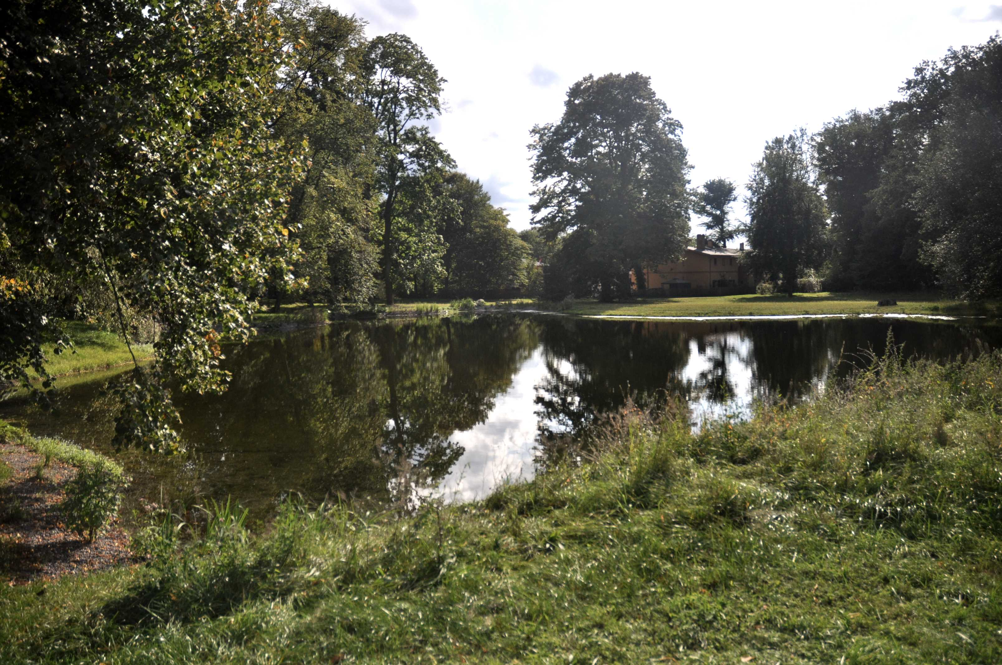 Glienicker Park, rekonstruierter Schlossteich von Norden